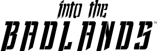 Logo de la serie Into the Badlands